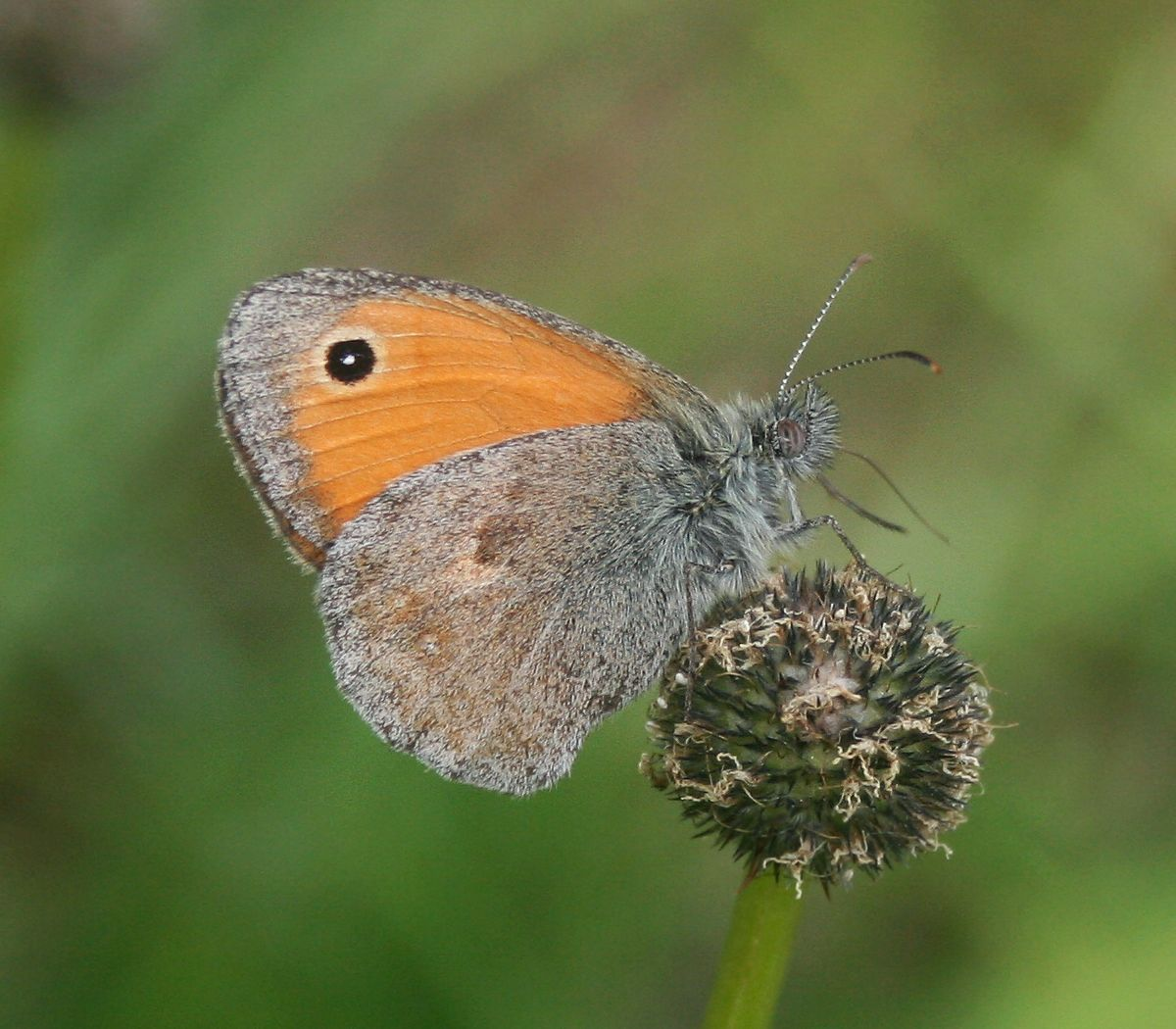 Kleines Wiesenvögelchen (Coenonympha pamphilus), Edelfalter (Nymphalidae) - Slowenien/Slovenija/Slovenia: Primorska, Podgorje